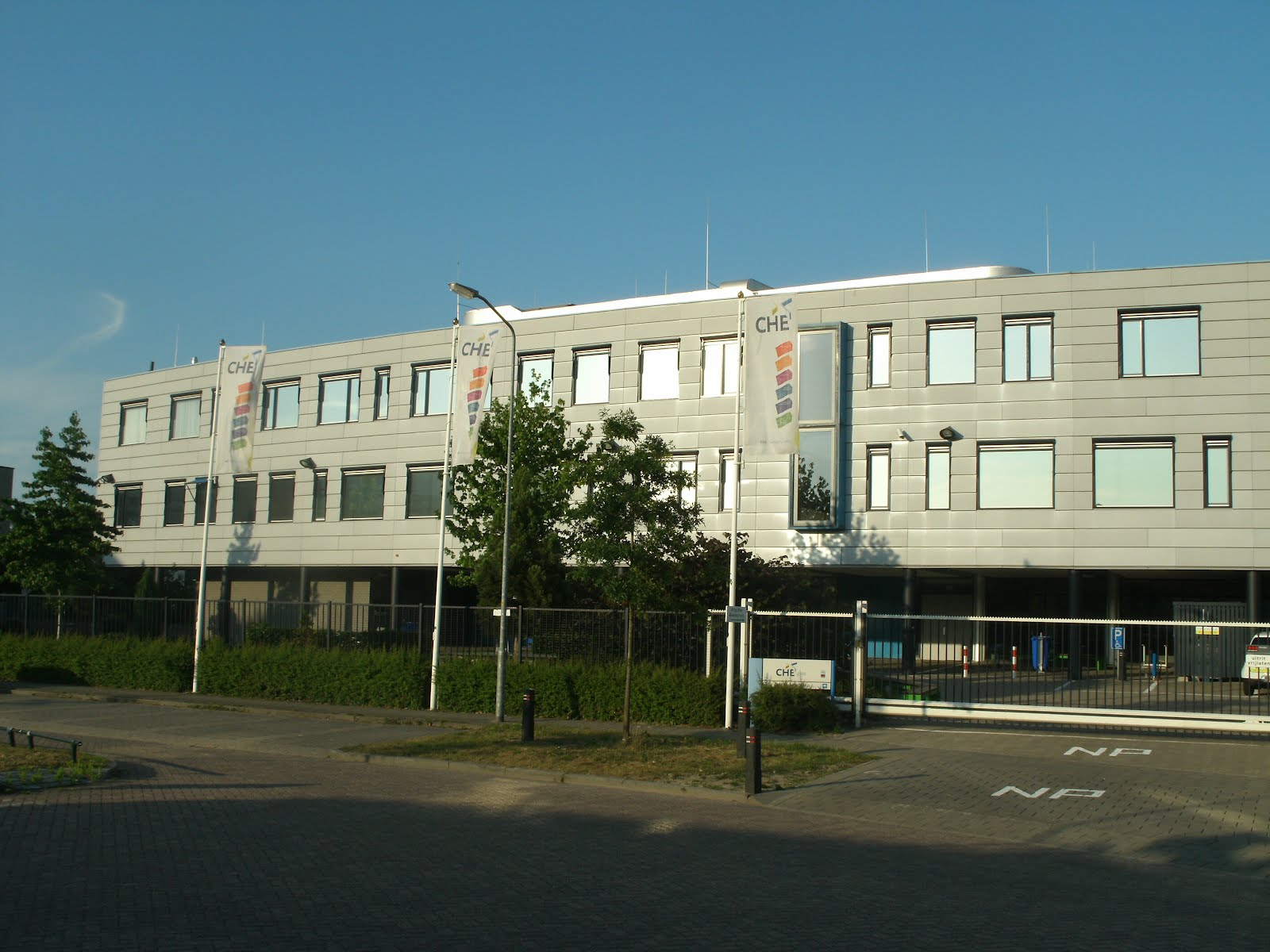 Christelijke Hogeschool Ede CHE